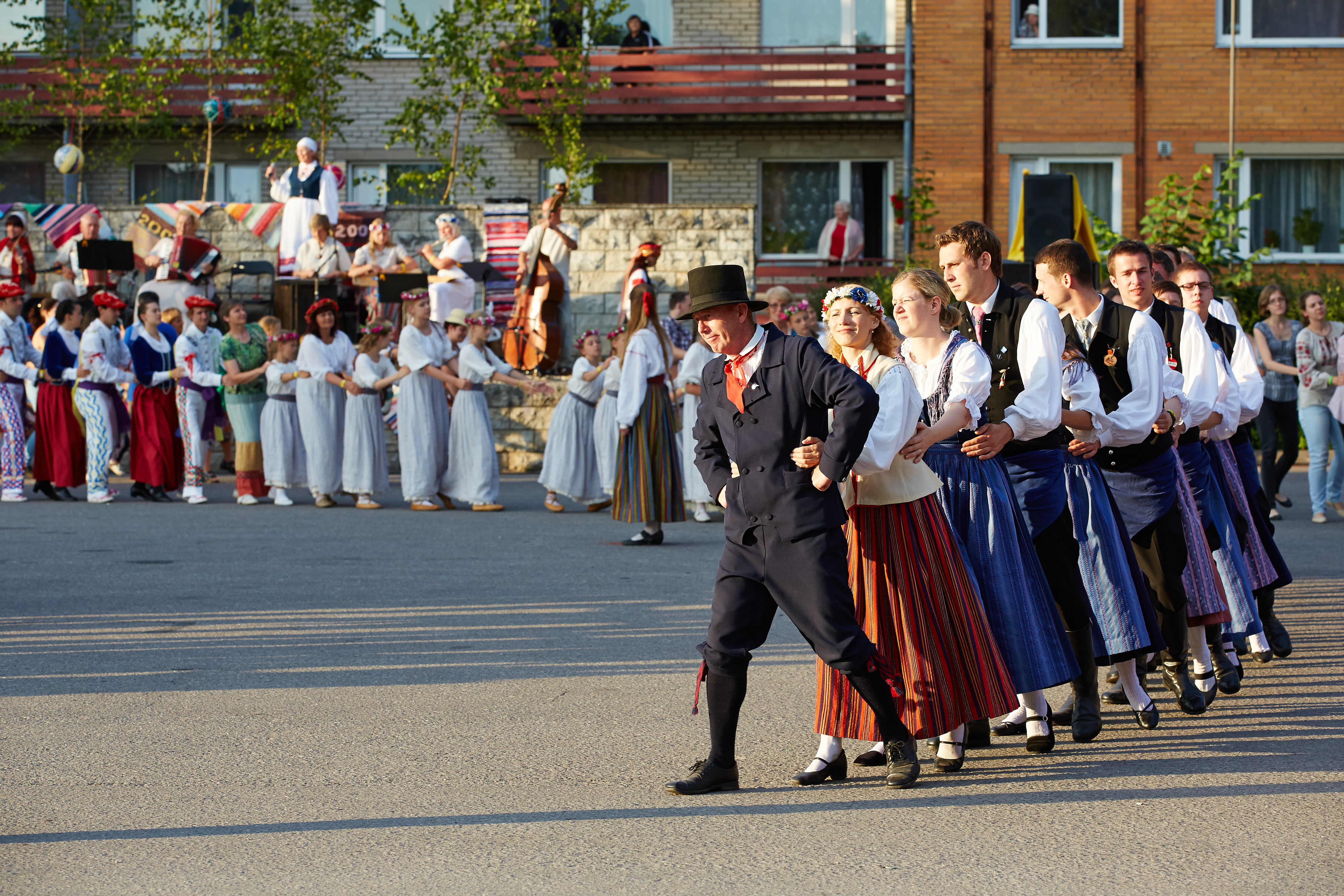 Sabatants XX Võru Folkloorifestivalil 2014. aastal